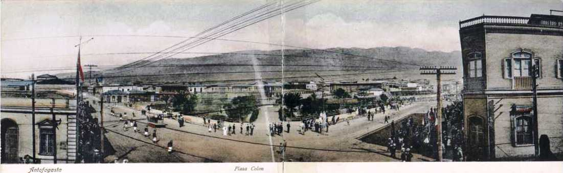 Postal de la Plaza Colon de Antofagasta, Chile.